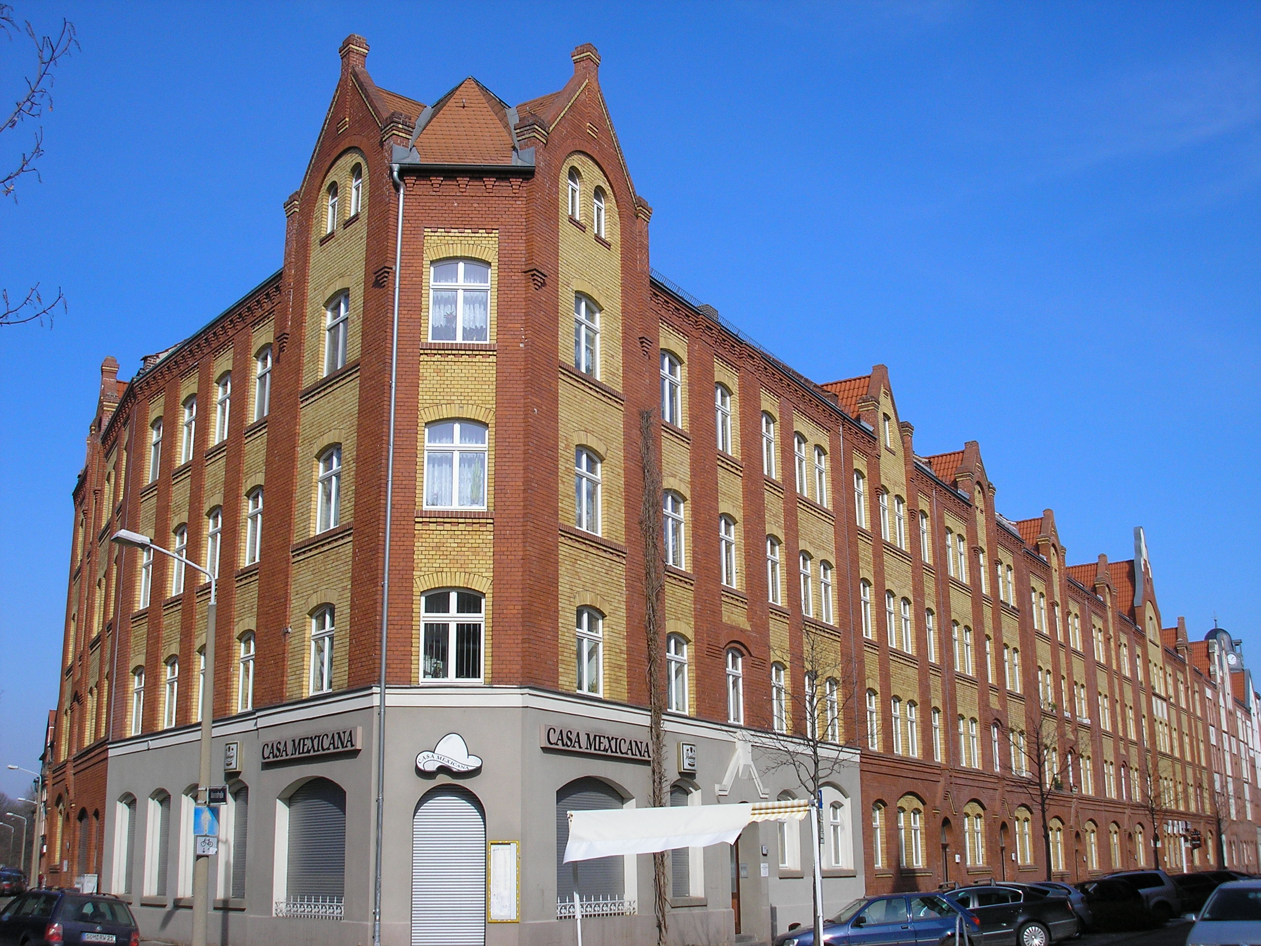 Blick durch die Karlstraße mit frühen Genossenschaftswohnungen in Erfurt.